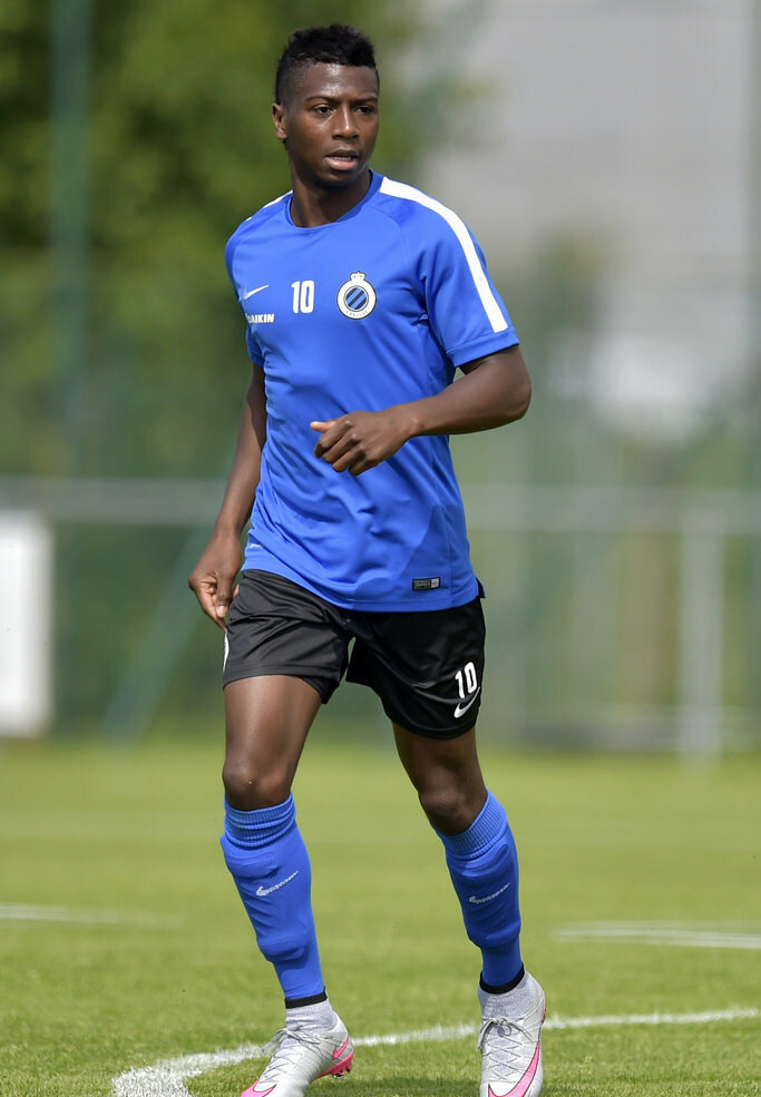 Séance d'entrainement